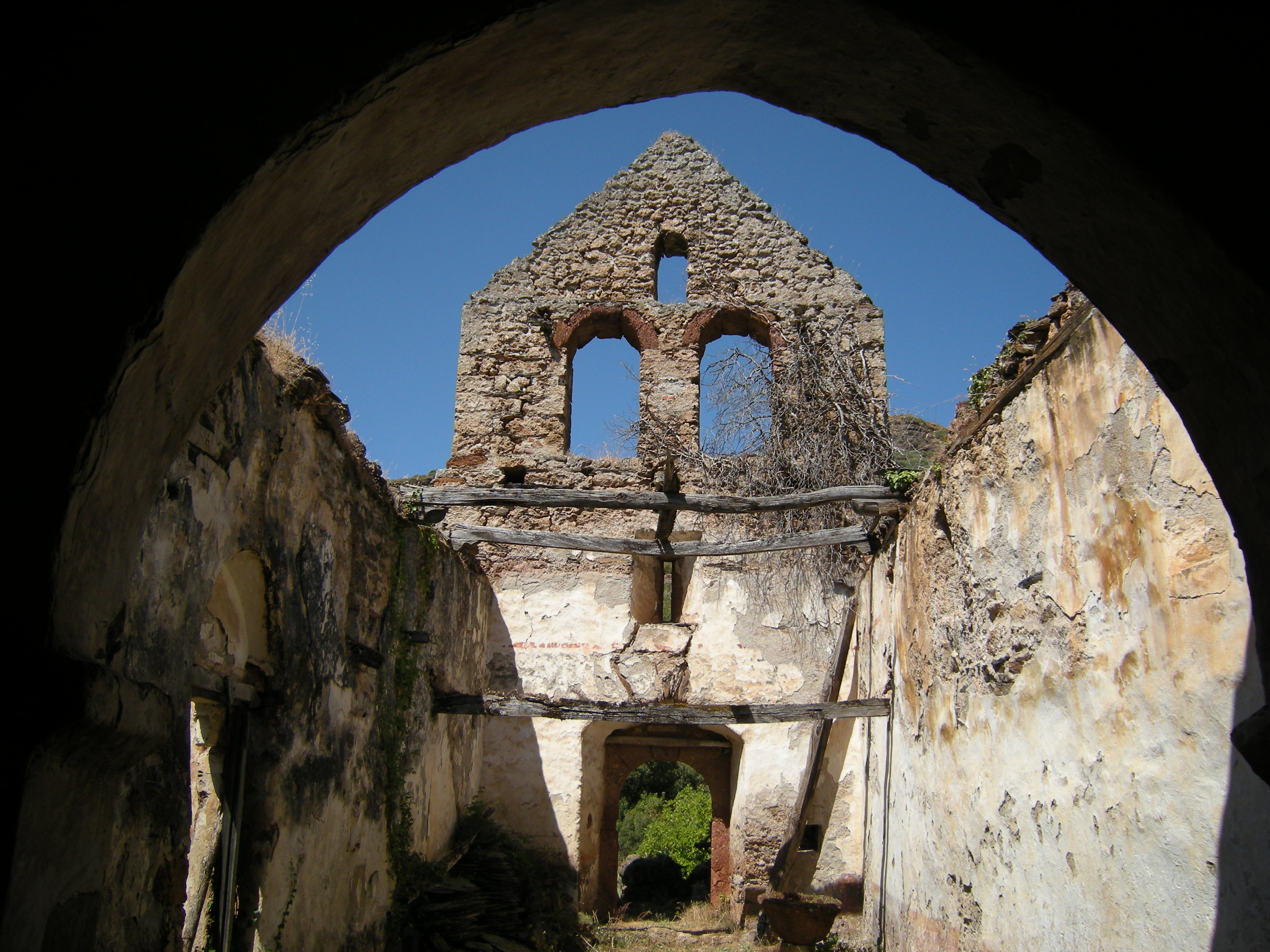 Iglesia de Santo Estevo de Pardollán